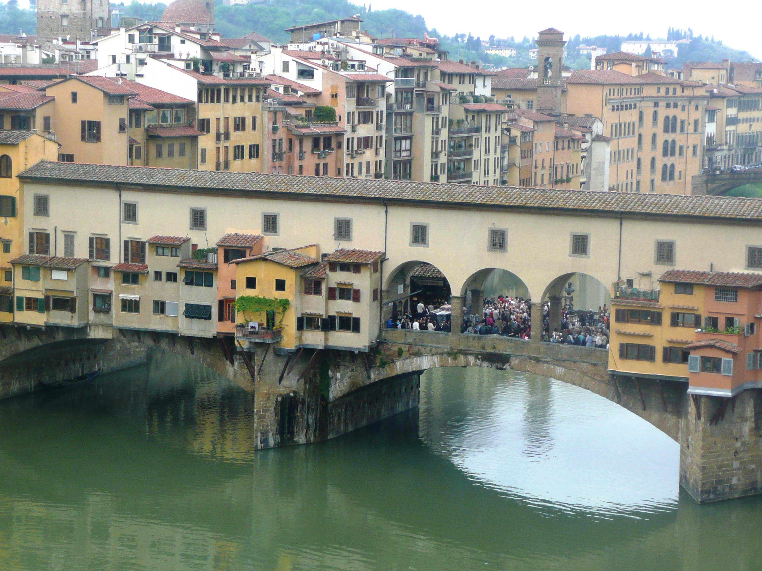 Міст "Понте Веккьо" (Старий міст) у Флоренції